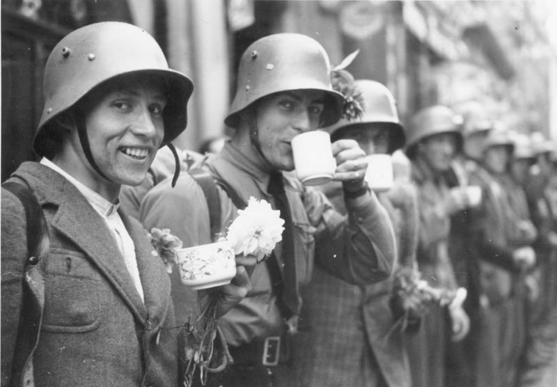 Einmarsch in das Sudetenland. Die Männer des sudetendeutschen Freikorps bekommen von der Bevölkerung Erfrischungen. Members of the Sudeten-German Voluntary Corps are served refreshments by the population. 3.10.1938 9.00 Uhr Eger. Sudetenland